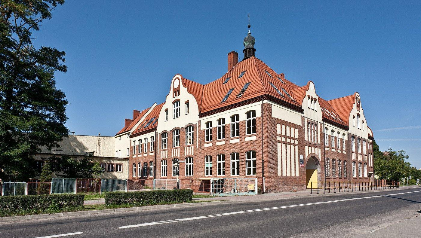 Obiekt wzniesiony w 1910 r. jako budynek szkolny. Wyremontowany w pocz. XXI w.